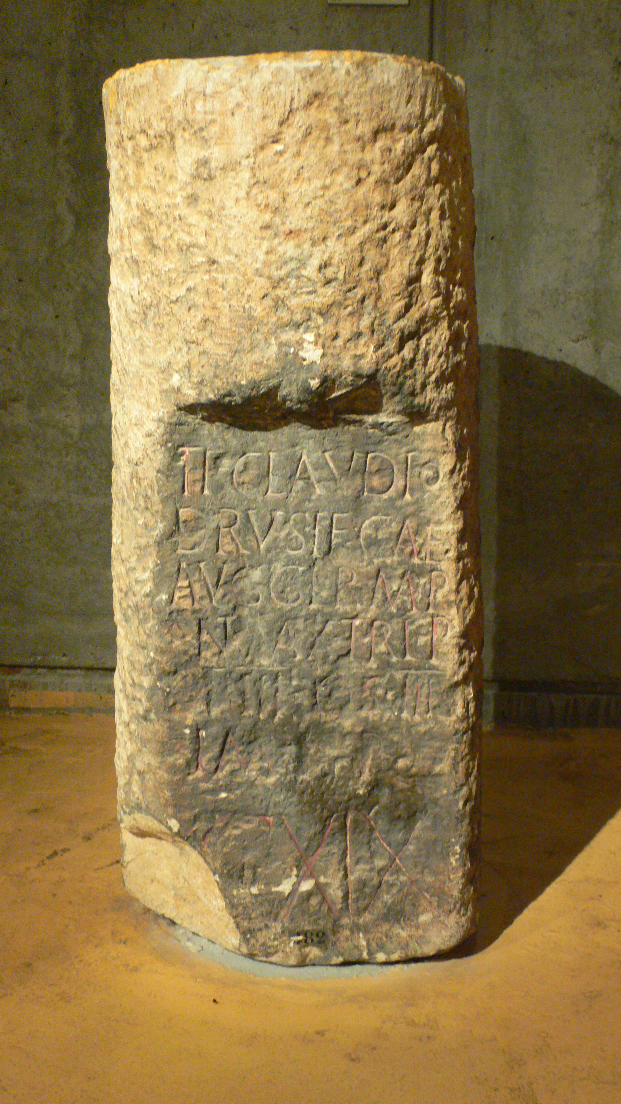 Musée gallo-romain de Fourvière (Lyon) - Borne miliaire de l'empereur Claude, trouvé au lieu-dit Quincieux, commune de Béligneux dans le département de l'Ain en 1879 à une dizaine de mètres de l'ancien chemin de Lyon au Bugey. Selon la Carte archéologique de la Gaule - l'Ain 01 (p. 111), le lieu de la trouvaille n'est pas le lieu d'origine de la borne qui aurait été déplacée de 5 km. La numérotation de la borne pose également problème, notamment la dernière ligne CXIX. Ti(berio) Claudio / Drusi f(ilio) Caes(ari) Aug(usto) Germ(anico) p/ont(ifici) max(imo) tri-bunicia) p/ot(estate) III co(n)su(uli) III / imp(eratori) p(atri) [p(atriae)] / [milia passuum] C(?)XIX.